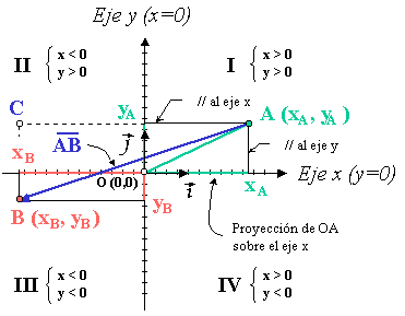 Coordenadas_cartesianas.png